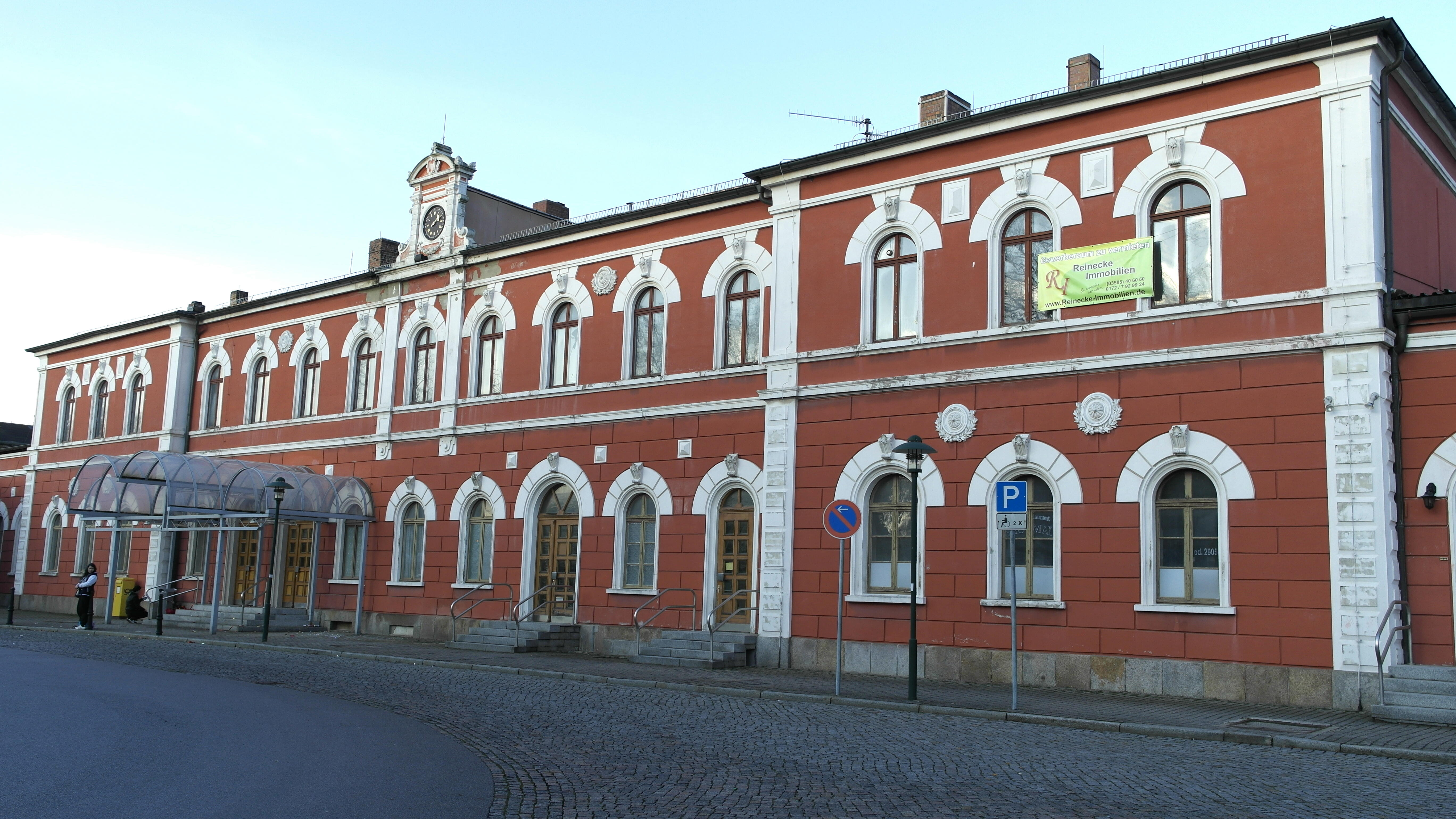 Löbau Bahnhof Zustand 2014